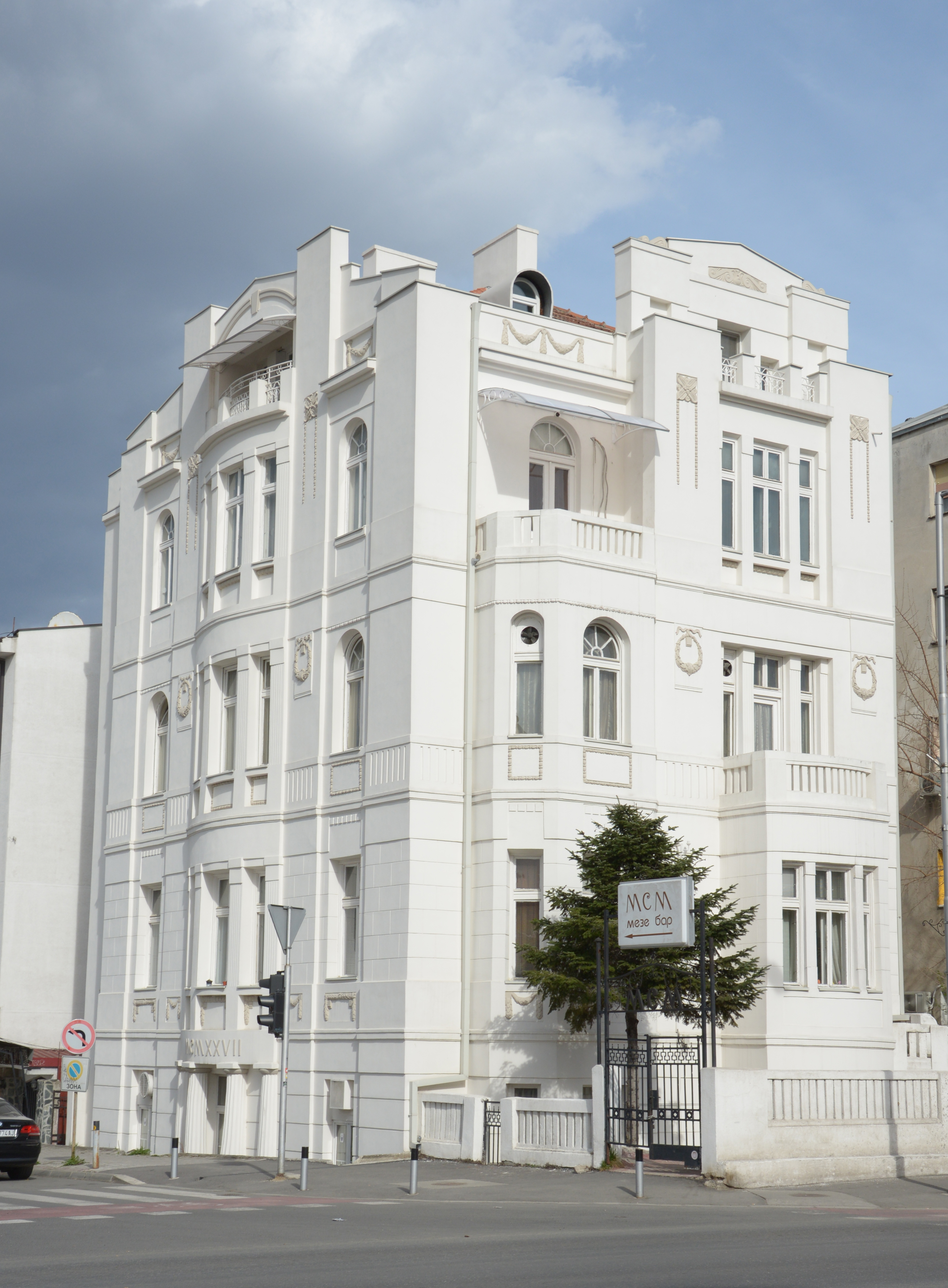 Палата Рубен - денешен изглед